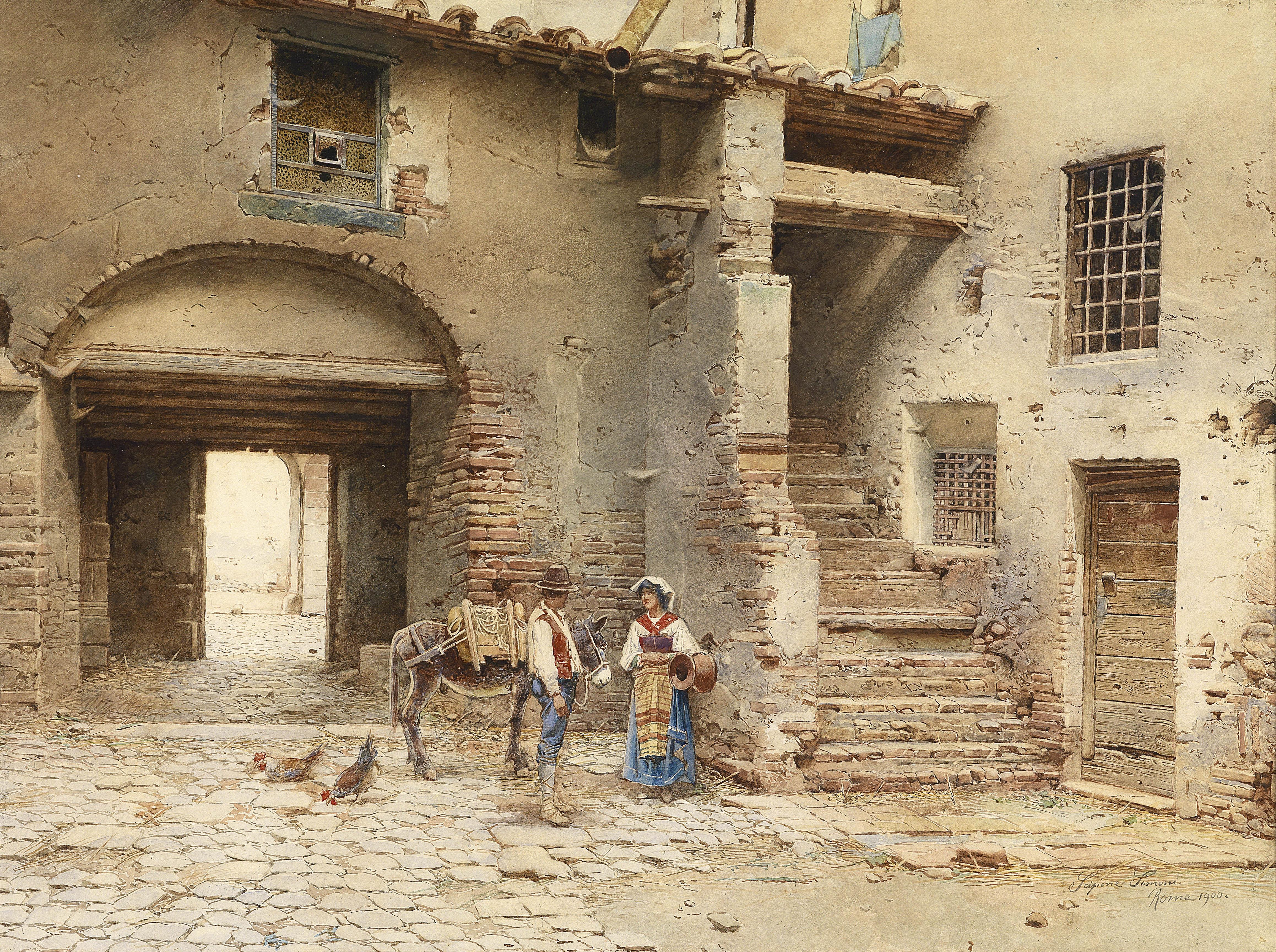 Italienischer Hof mit einem jungen Paar, Esel und Hühnern, signiert und datiert Scipione Simoni, Roma 1900, Aquarell auf Papier, 58,5 x 73 cm